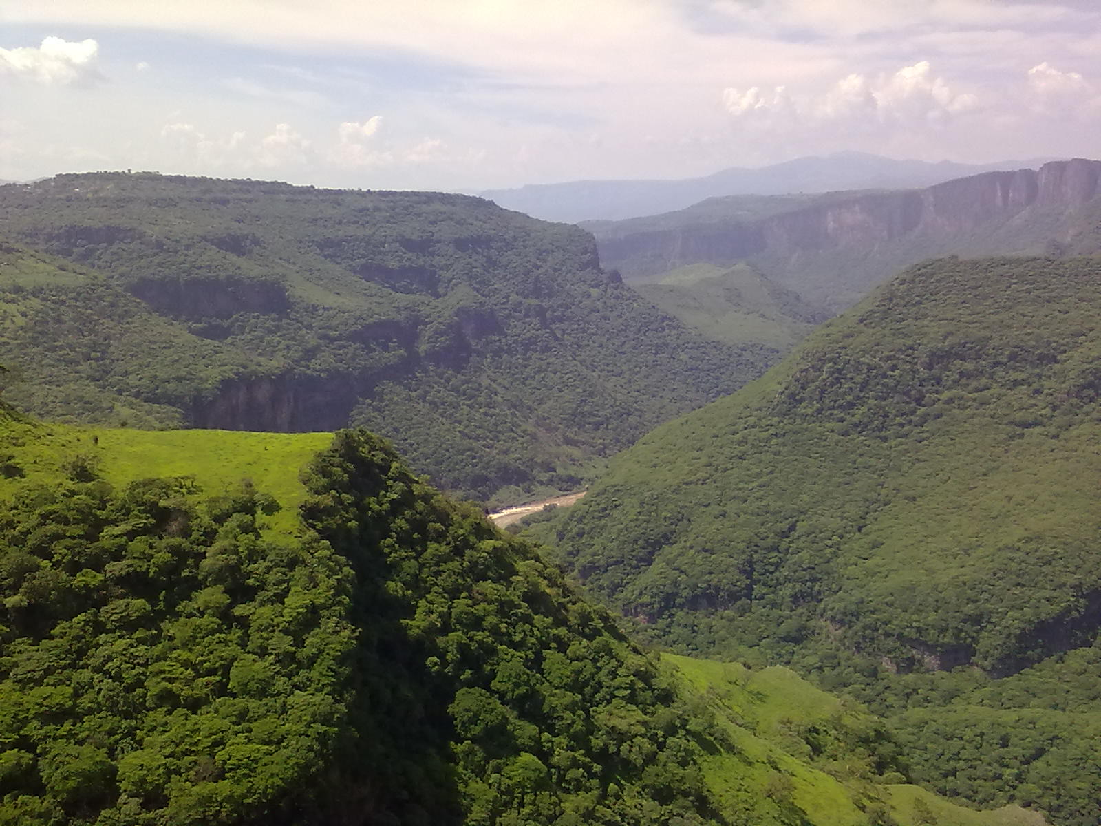 Vista desde la barranca de Huentitan